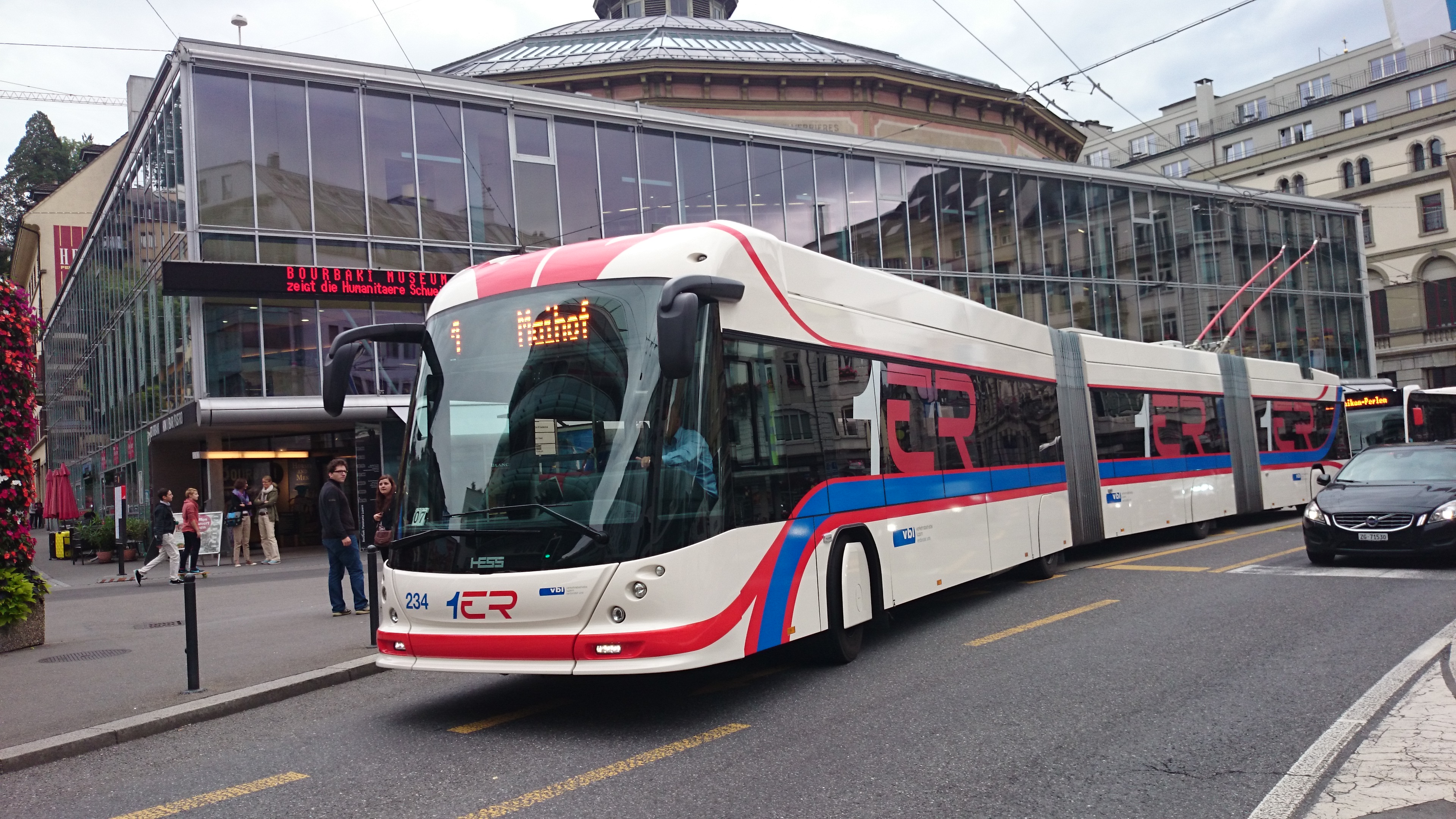 Doppelgelenk-Trolleybus des Systems RBus in Luzern